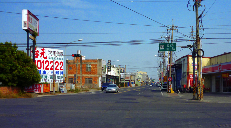 位於高雄市永安區維新路上的市道186號起點。